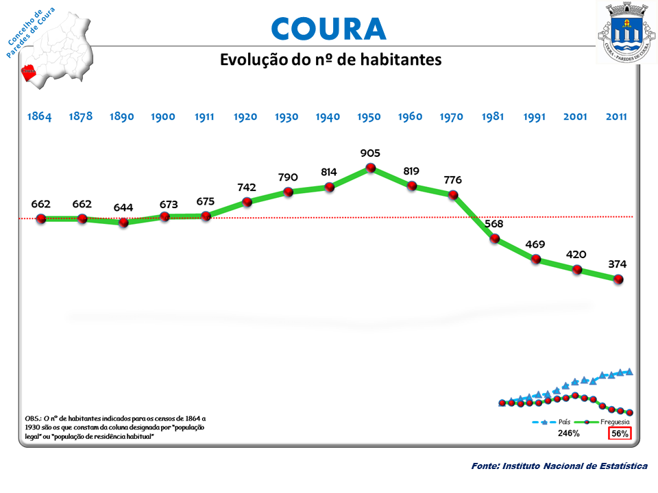 Censos 1864/2011